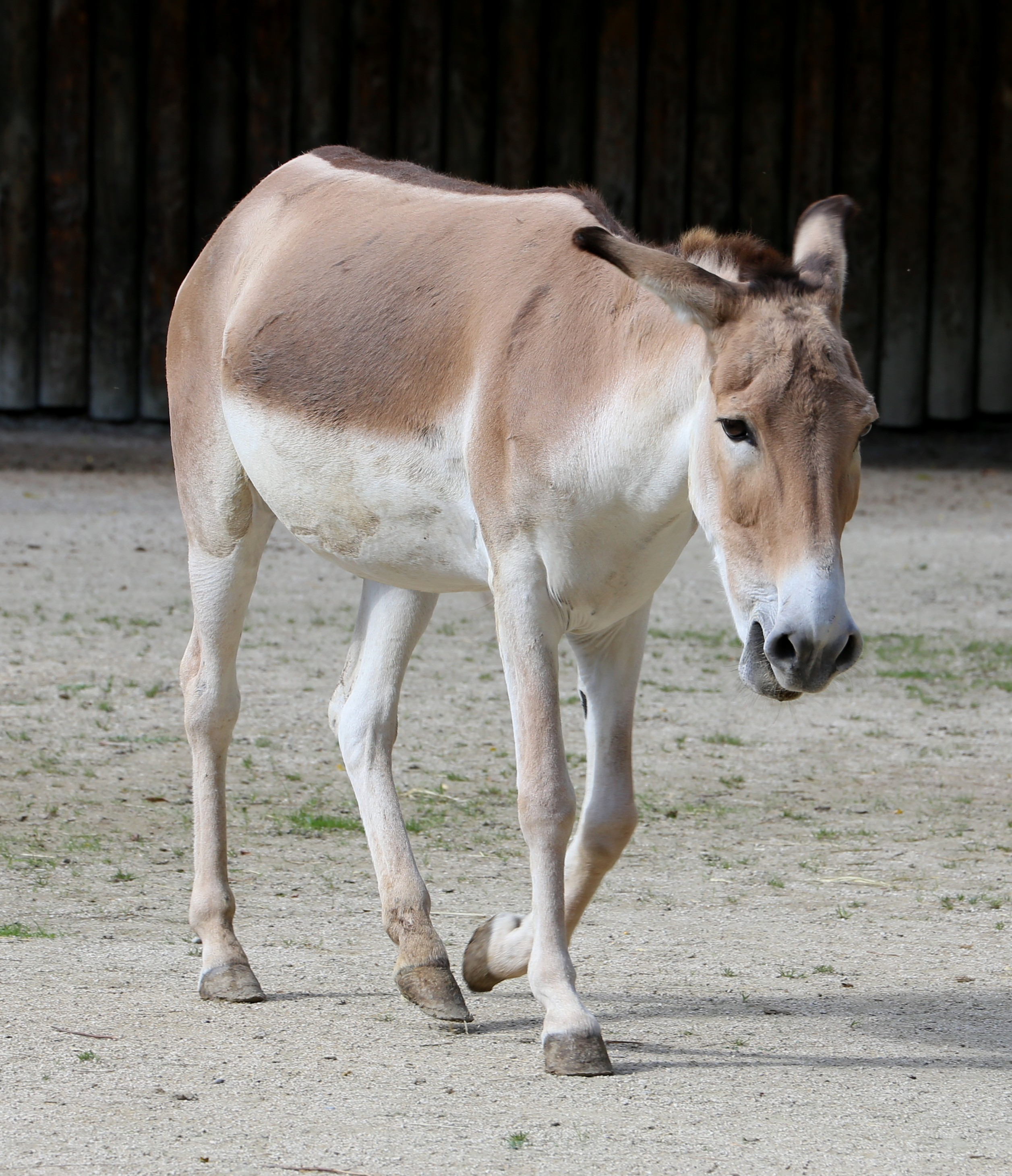 Onager (Asiatischer Wildesel), Equus hemionus onager, Zoo Augsburg